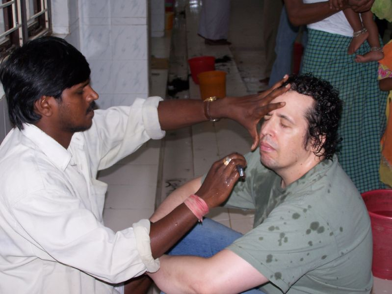 కళ్యాణకట్టలో తలనీలాలు సమర్పిస్తున్న దృశ్యం.